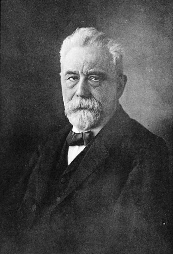 Wilhelm Lexis (1837-1914), deutscher Volkswirtschaftler